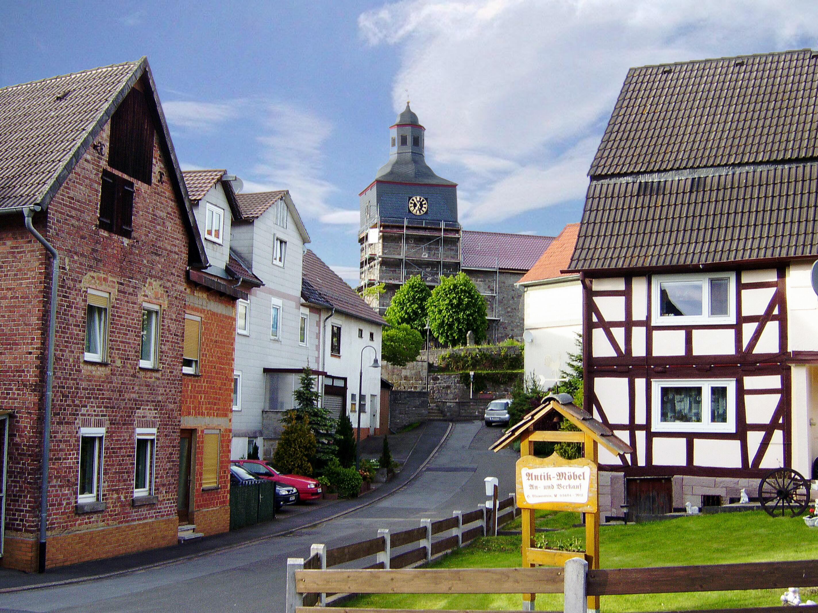 Laudenbach - Kirche